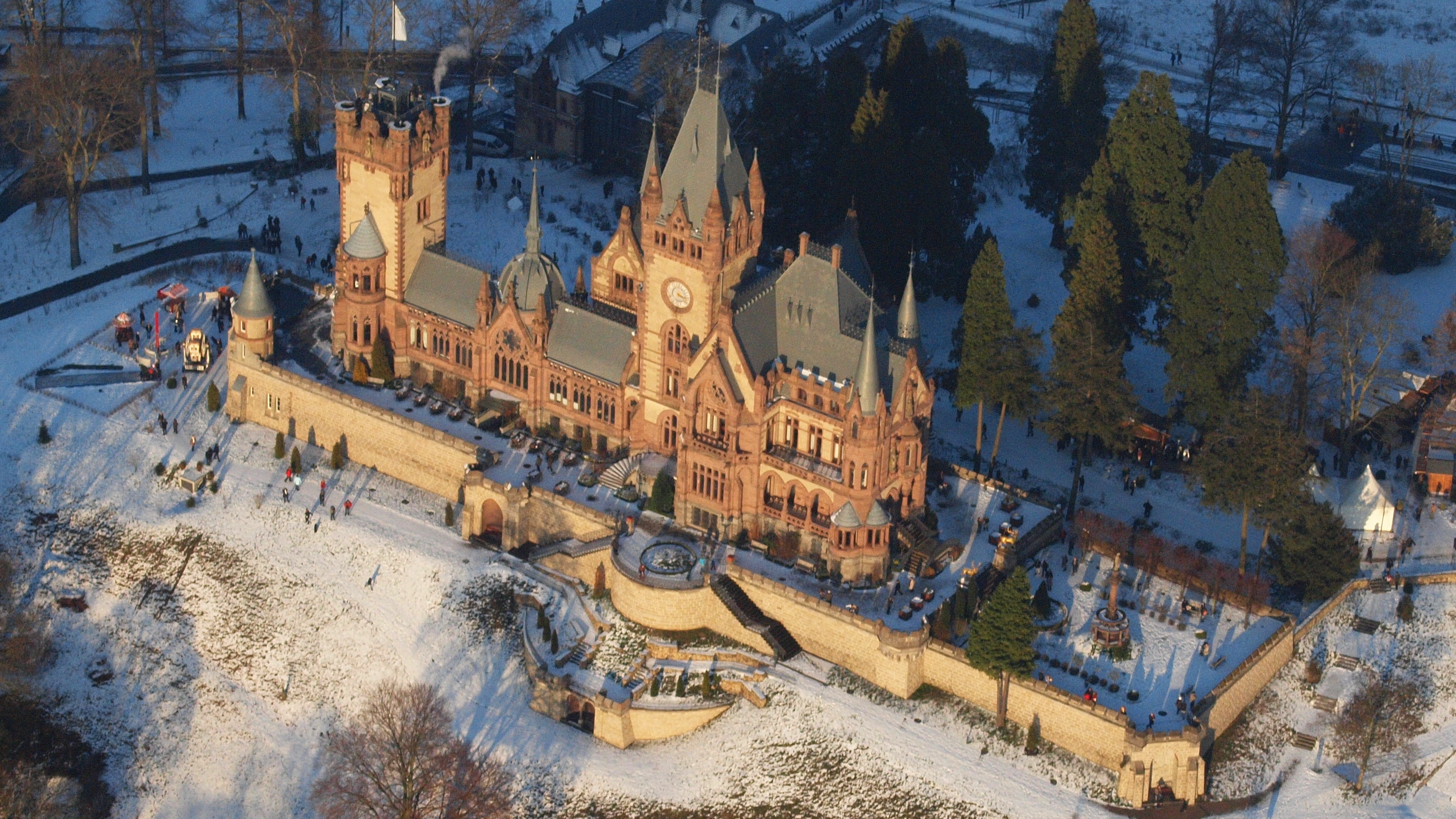 Drachenburg im Siebengebirge, Luftaufnahme